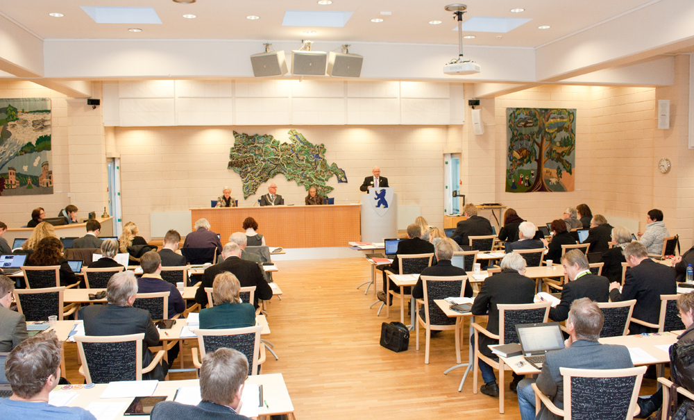 Fylkestinget i Buskerud. Foto: Buskerud fylkeskommune